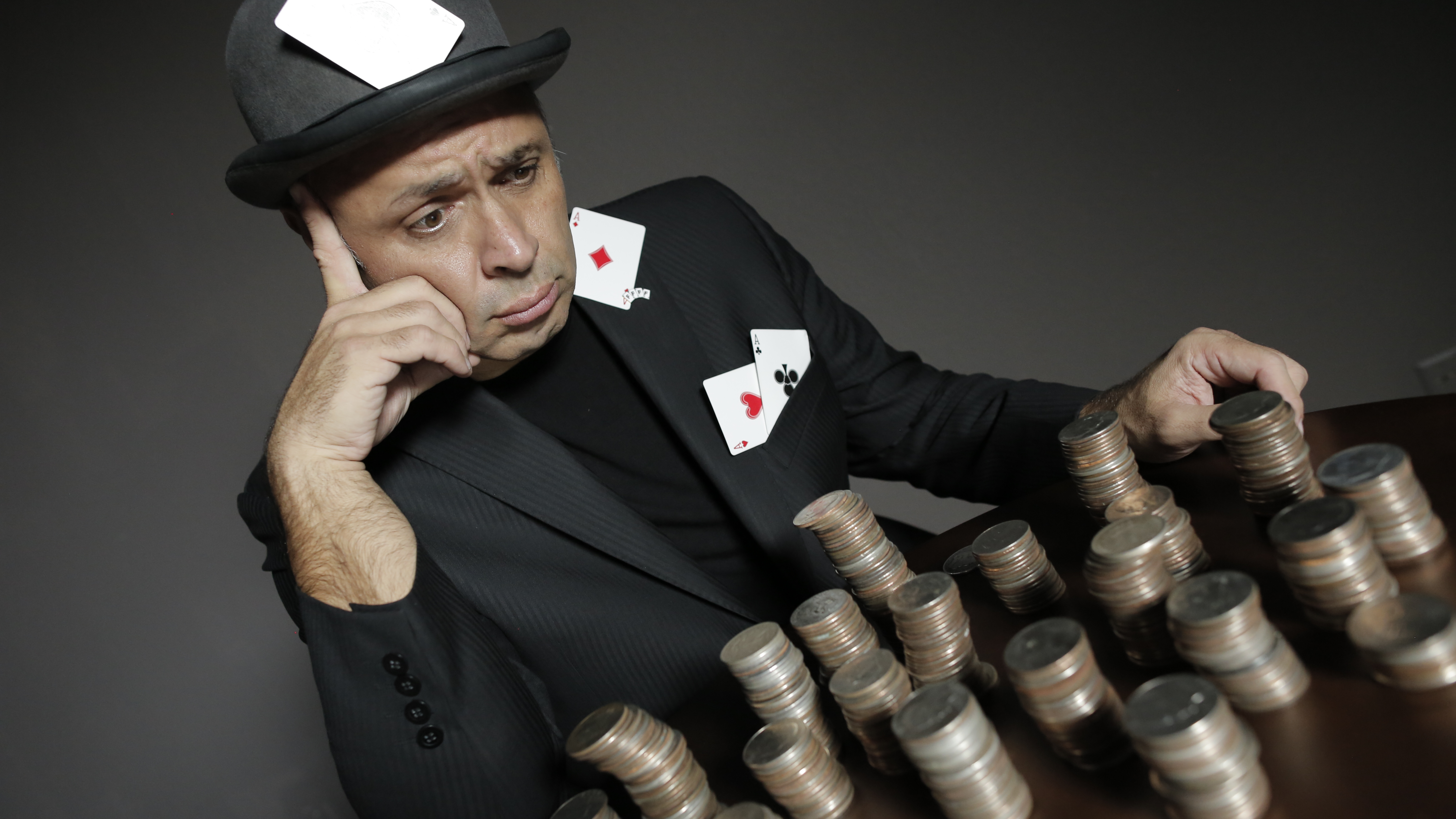 Premio Mundial de Invencion en Magia 2012